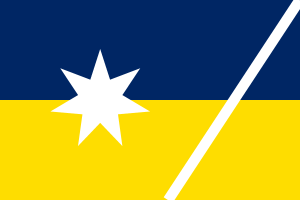 Wysmierzyce (Wысмерзыӂэ) Bayrağı